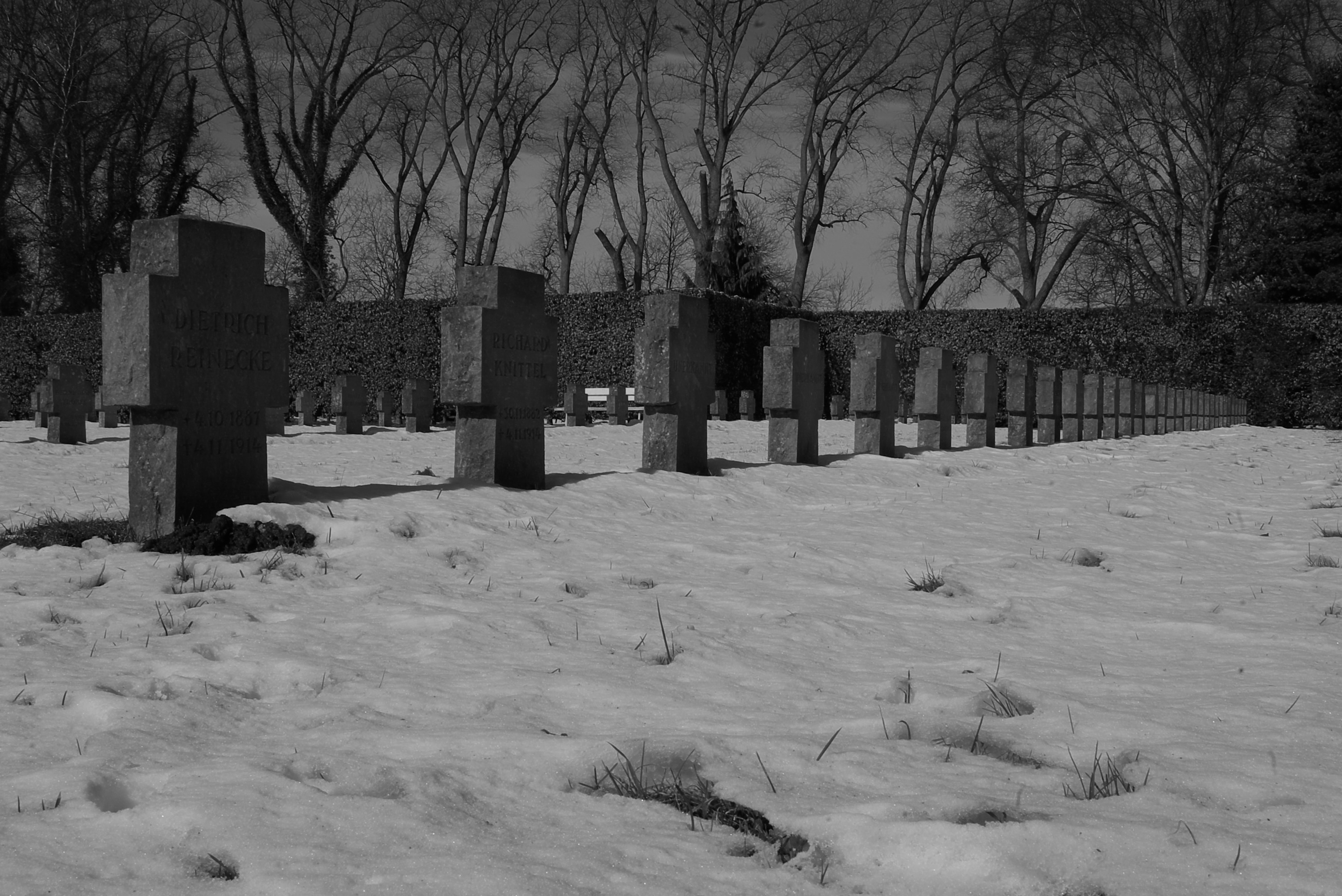 Ehrenfriedhof Wilhelmshaven Skagerakschlacht Gräber junger Gefallener